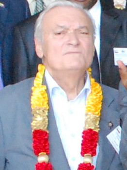 Photo de groupe des délégations françaises avec des responsables politiques comoriens.